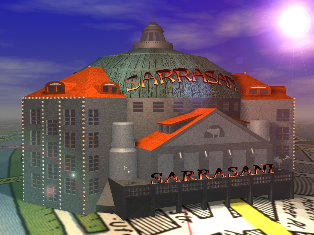 Zirkushaus des Zirkus Sarrasani in den 1930er Jahren, Nachbau mit 3D-Rendering-Software trueSpace 2. Quelle: , Urheber: Betreiber von Genehmigung nachträglich erteilt, siehe Diskussion:Sarrasani.